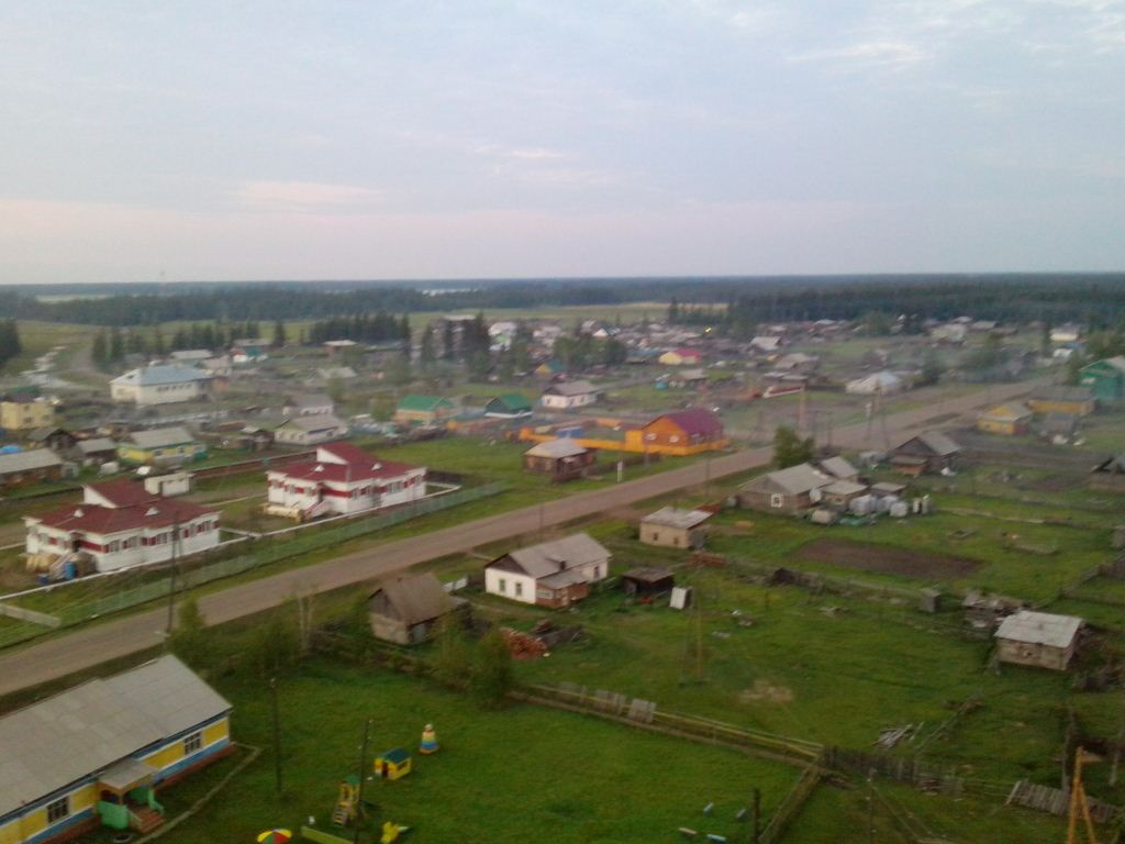 Фото село Тойбохой